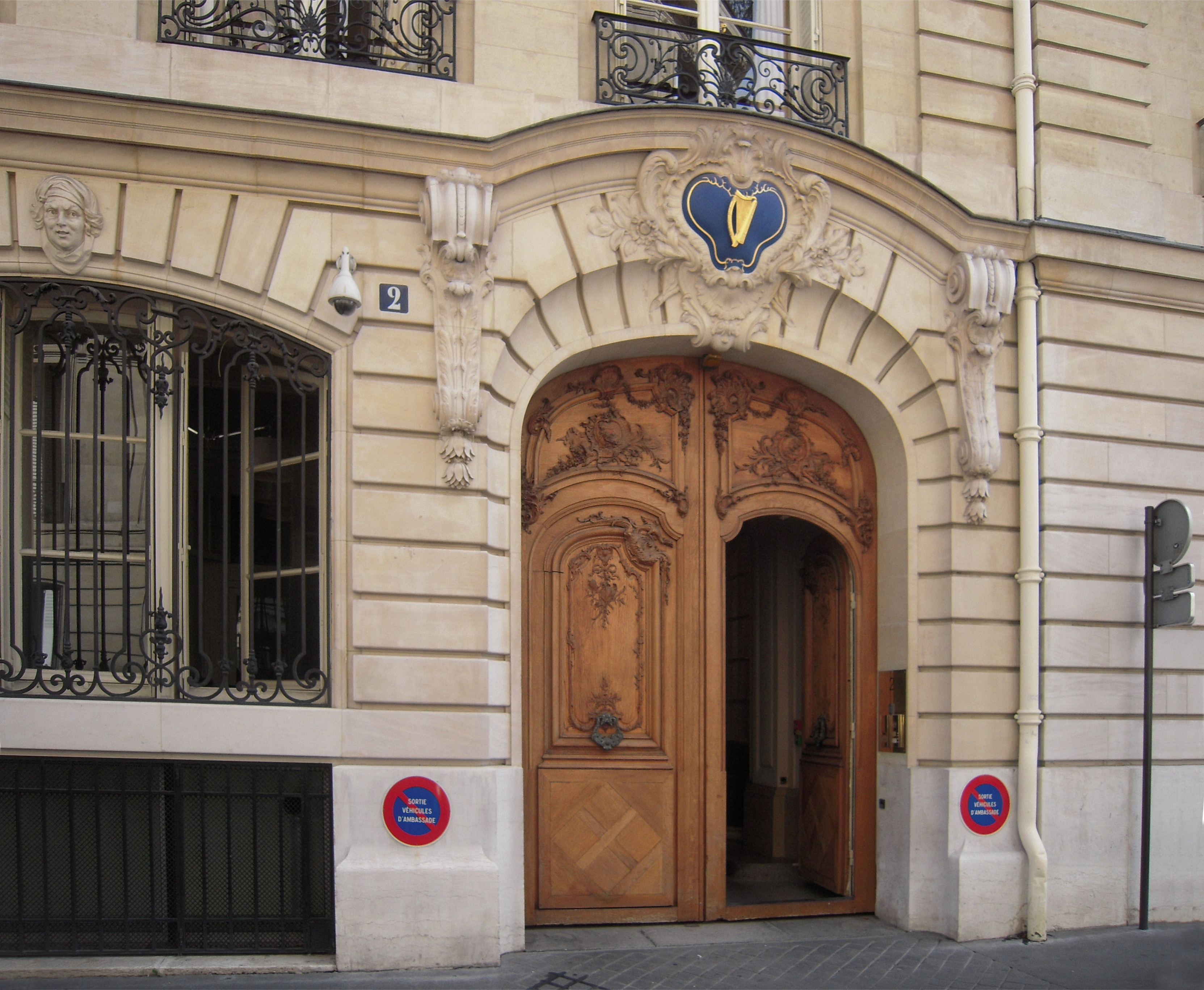 Armoiries de l'Irlande à l'hôtel de Breteuil, qui abrite l'ambassade d'Irlande à Paris.